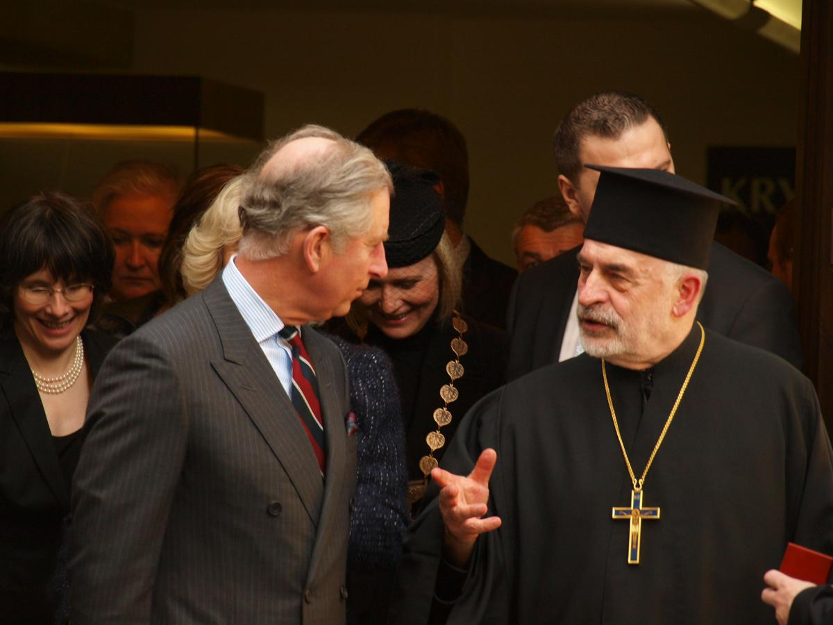 Otec Jaroslav a JKV Charles